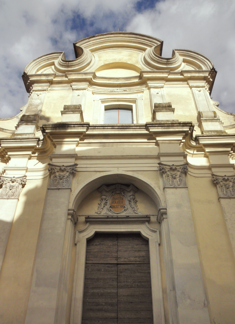 Chiesa di Santa Maria del Sole a Lodi